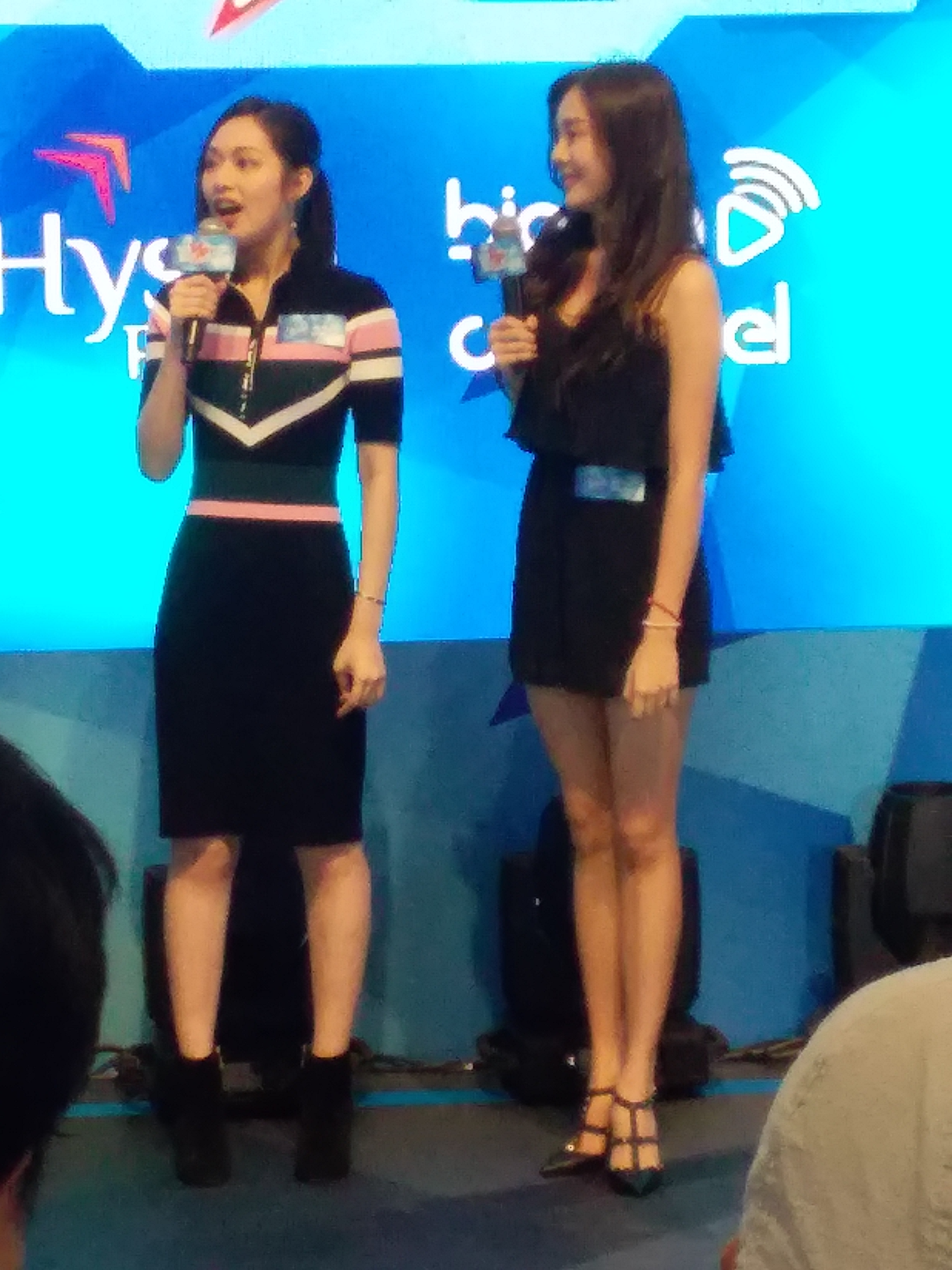 中文（香港）: 馮盈盈於2018年8月8日到銅鑼灣出席電視台互動遊戲推廣活動